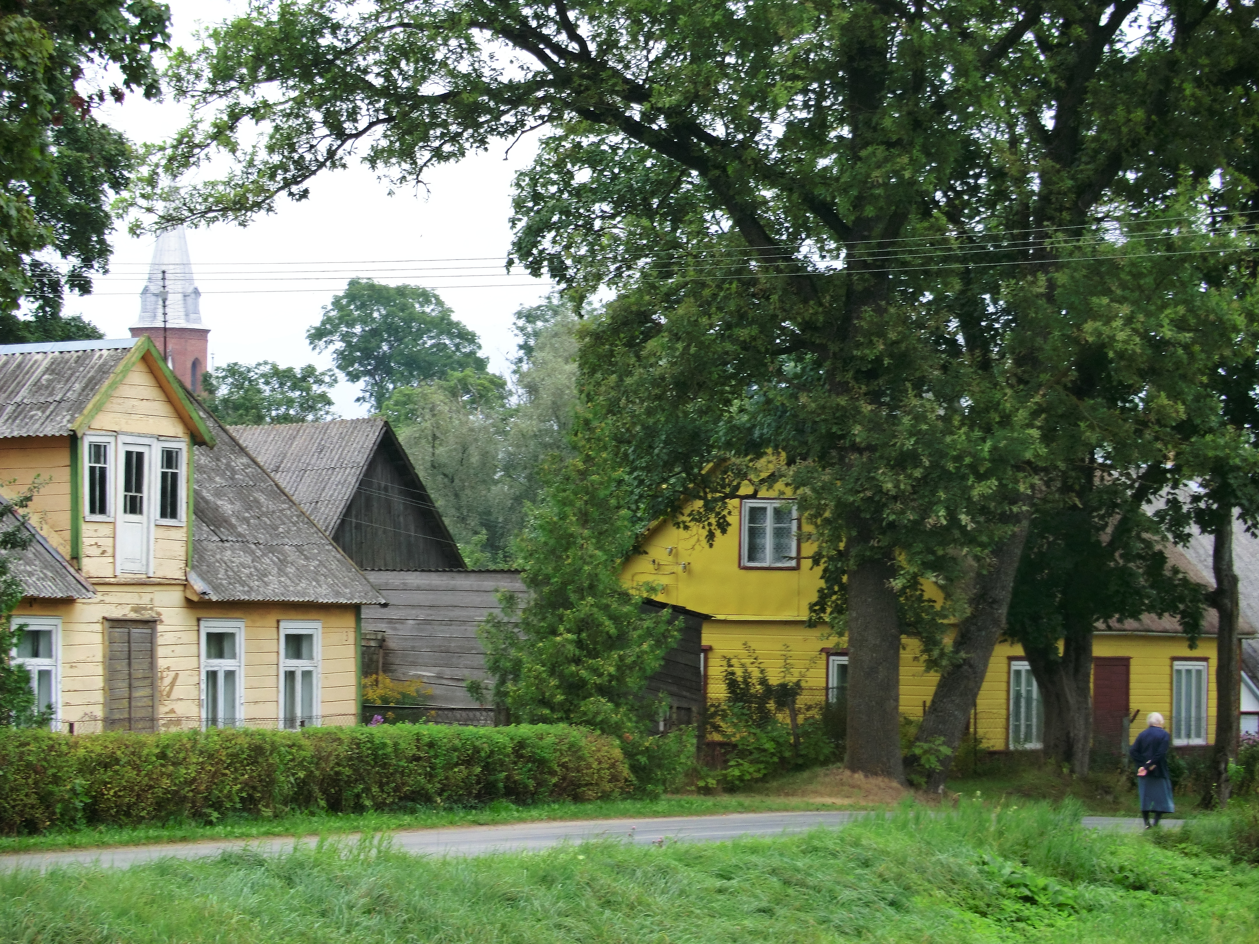 Панемунис